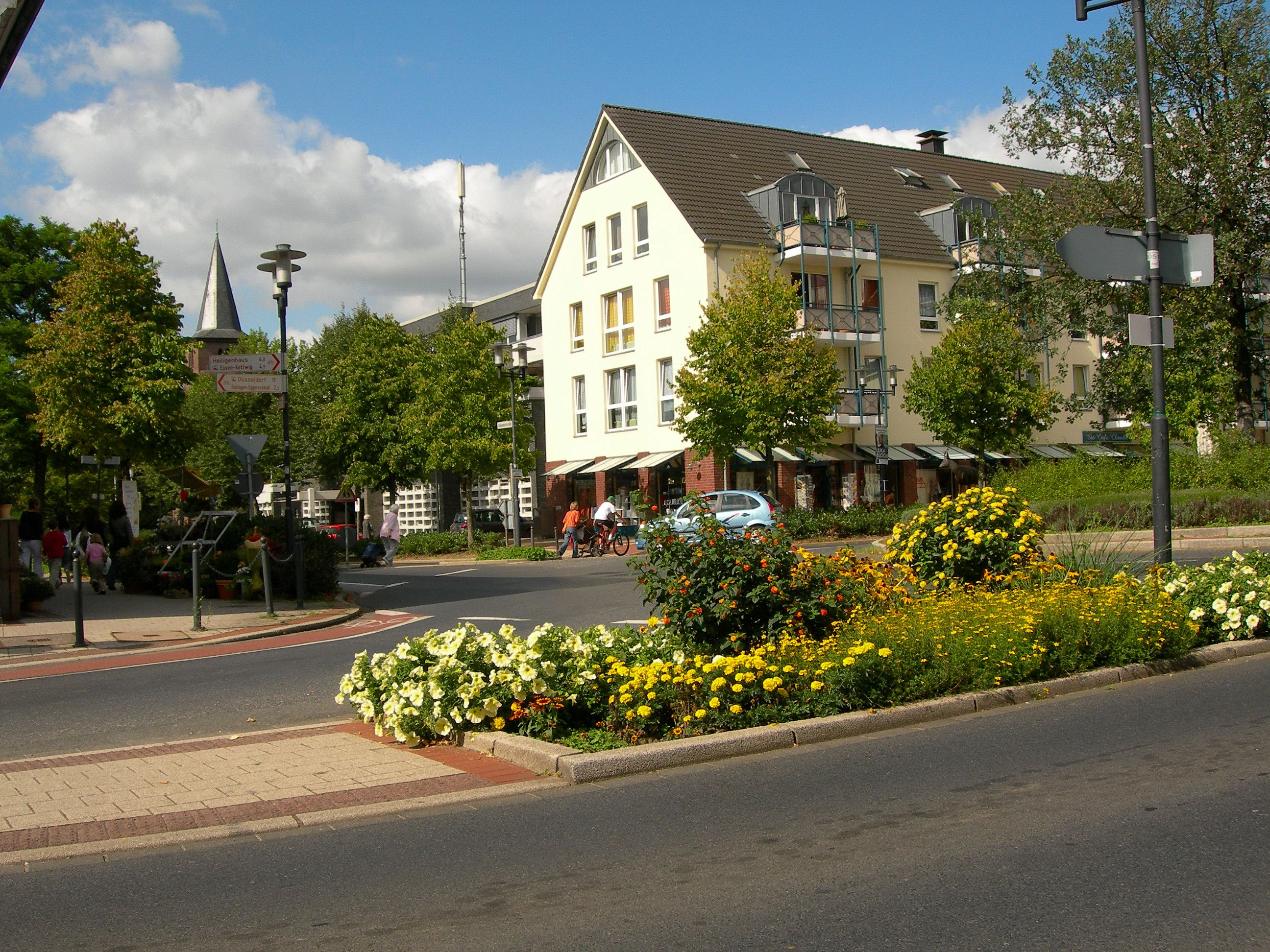 Hösel (Ratingen), North Rhine-Westphalia